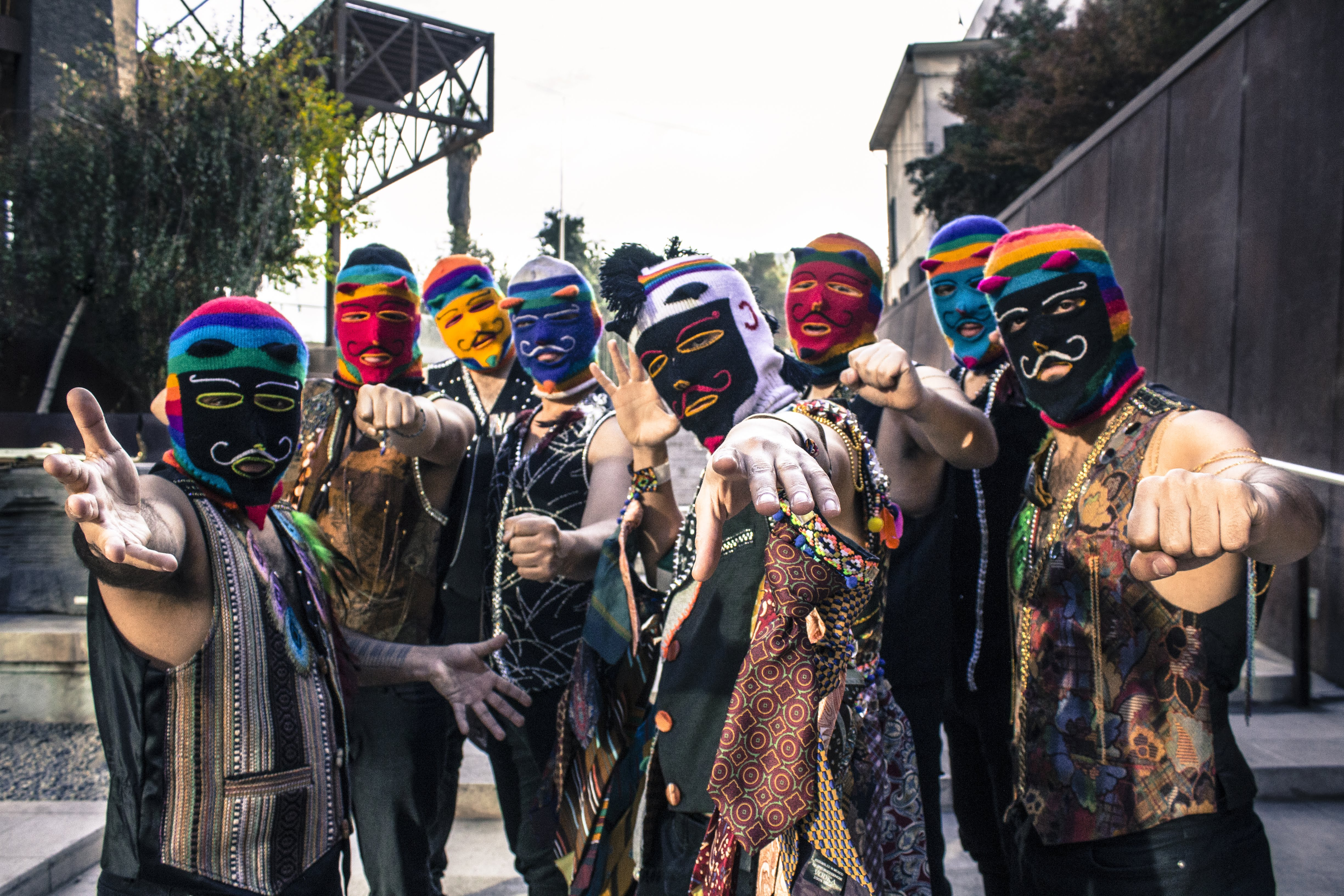 La Sagarad y sus trajez caracteristicos de su "Skarnaval Latinoamericano"